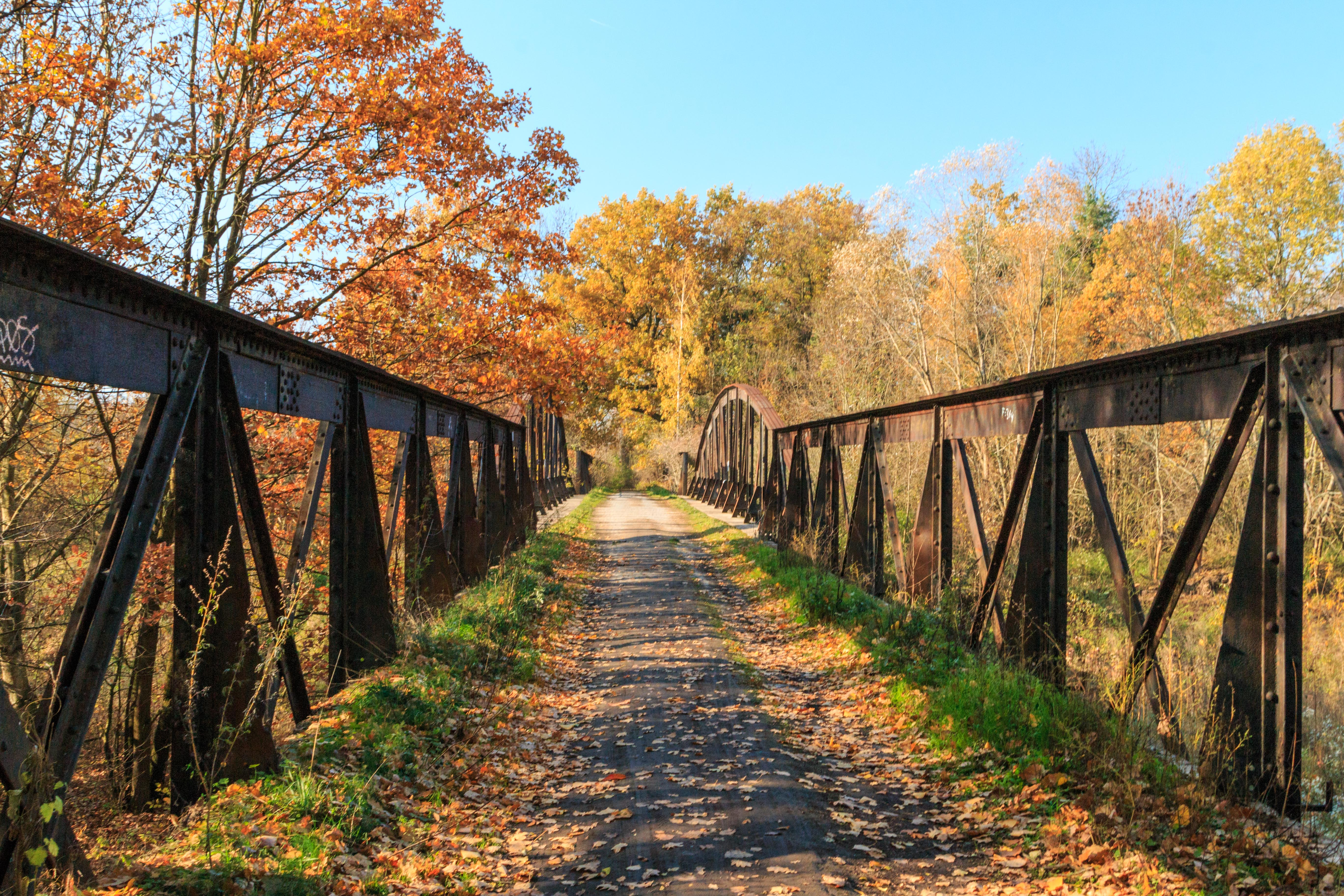 Most Červeňák v Pardubicích